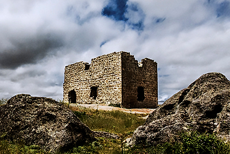 Castillo of El Mirón, Castilla y León (Spain)